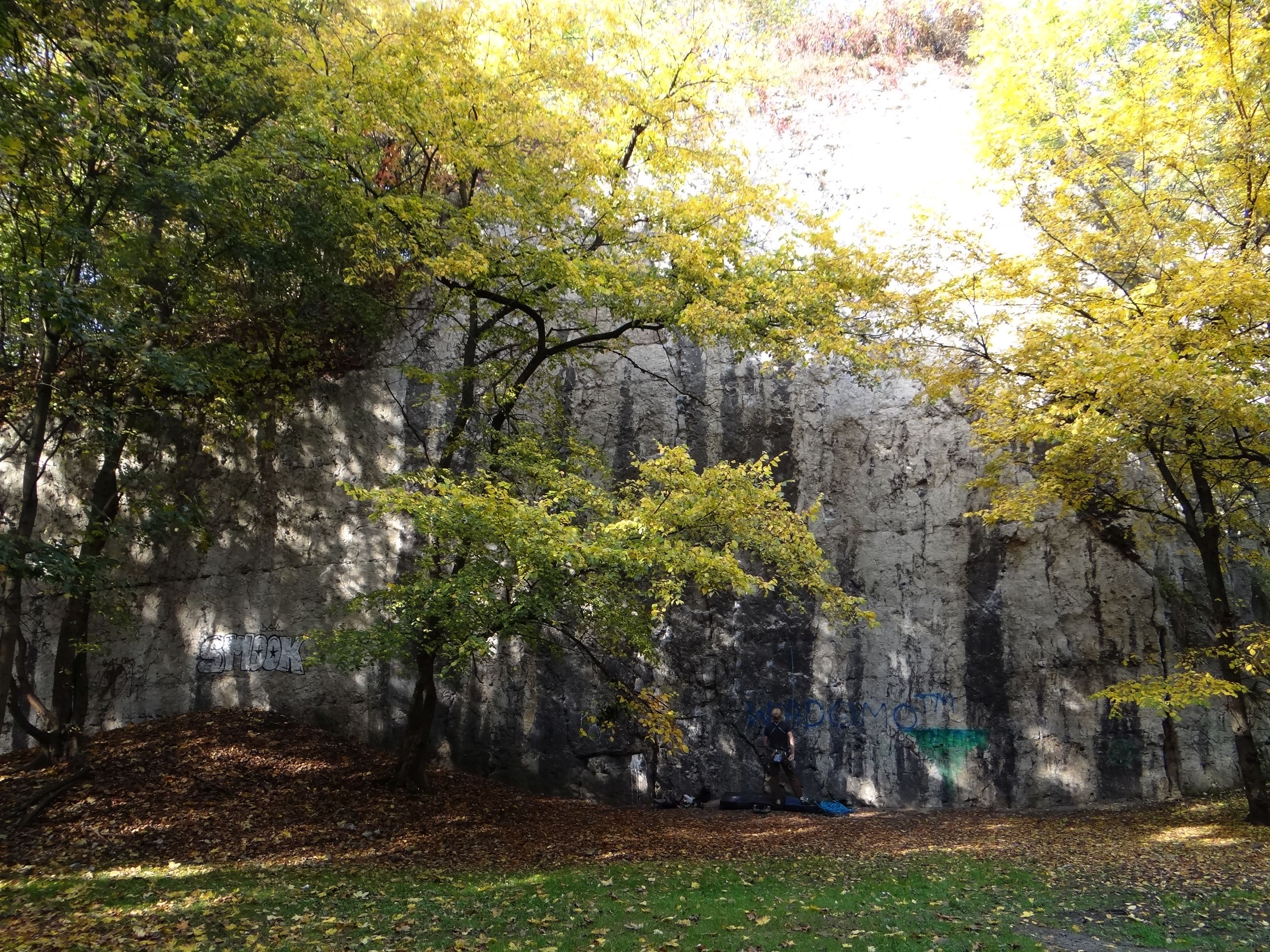 Mur skalny "Esteci" w dawnym kamieniołomie pod św. Benedyktem na Krzemionkach Podgórskich w Krakowie